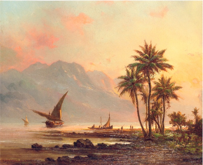 Pescadores en enbarcación en río Guárico - Venezuela (c.1850). Óleo sobre tela obra de Fritz Melbye(1826-1896)